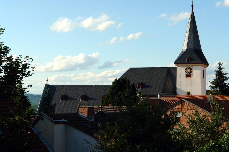 Church in Soergenloch, Germany